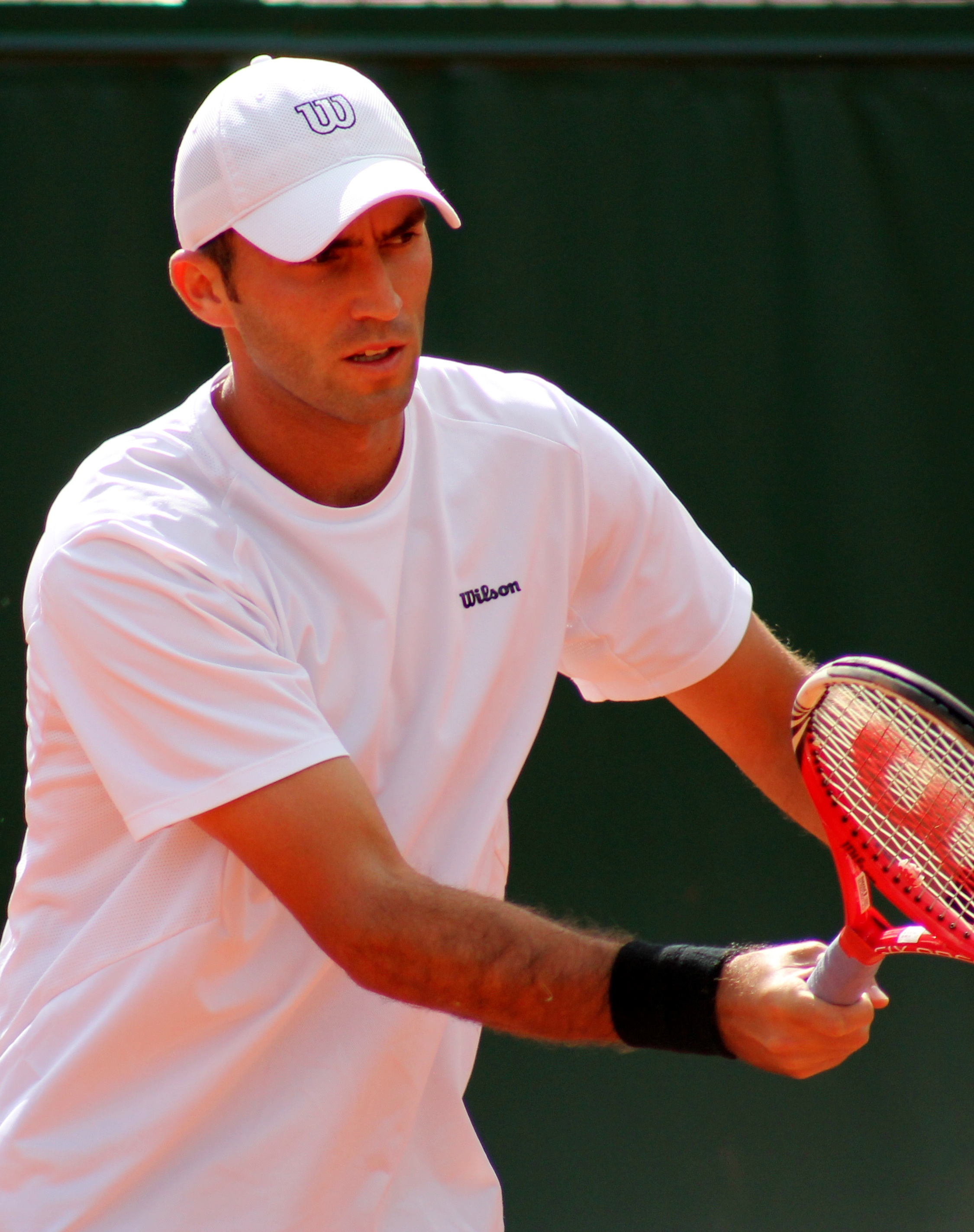 Tecau RG13 (8)